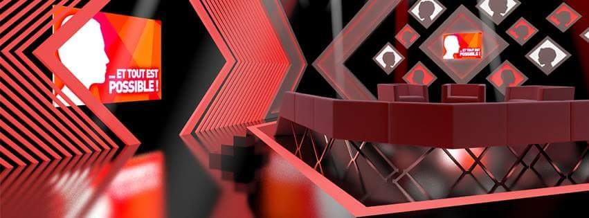 Studio de l'émission …Et tout est possible! en juillet 2016